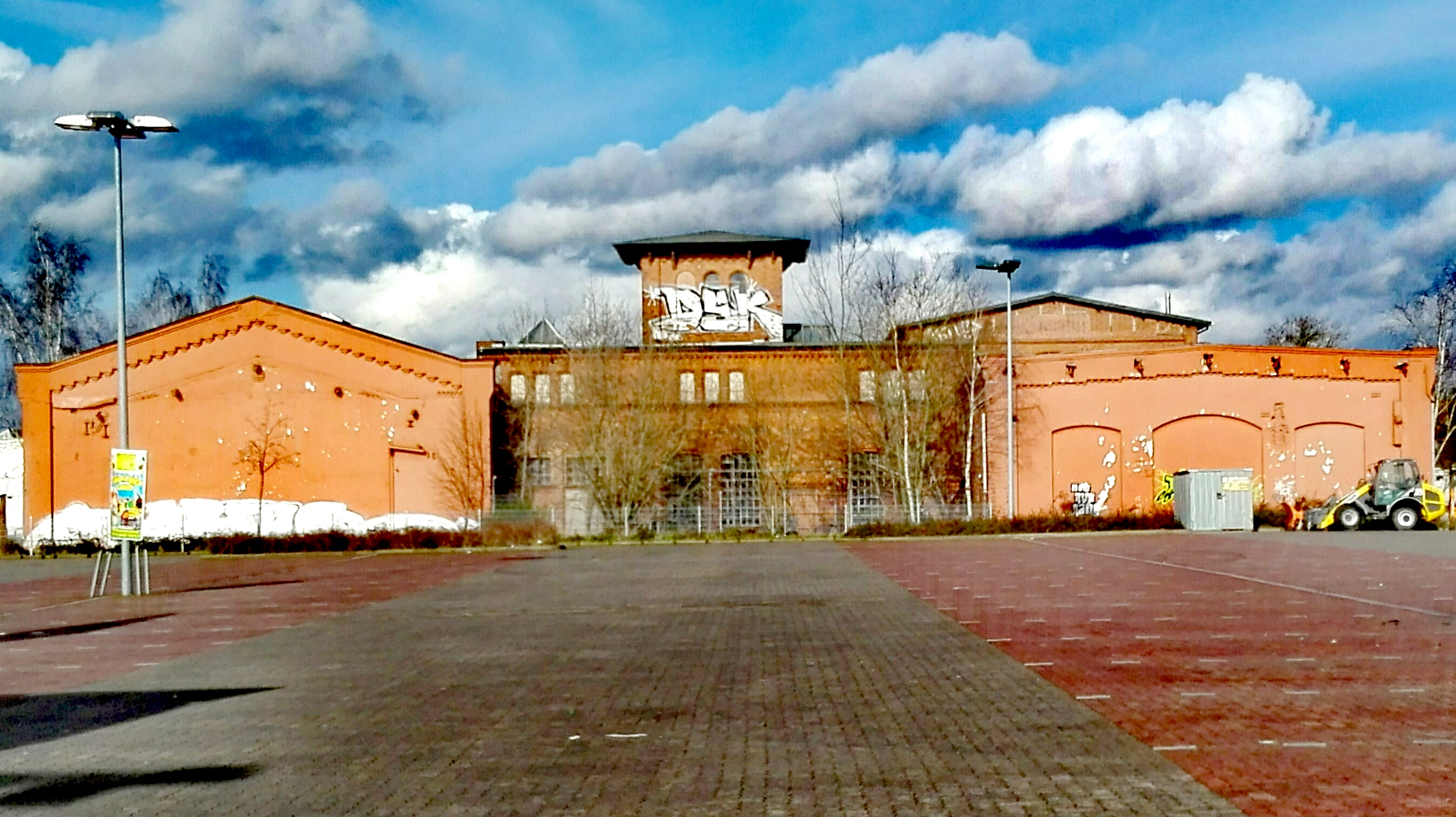 Einstiger Neubau der Werkstattanlagen von der Lübeck-Büchener Eisenbahn-Gesellschaft an der Cronsforder Allee